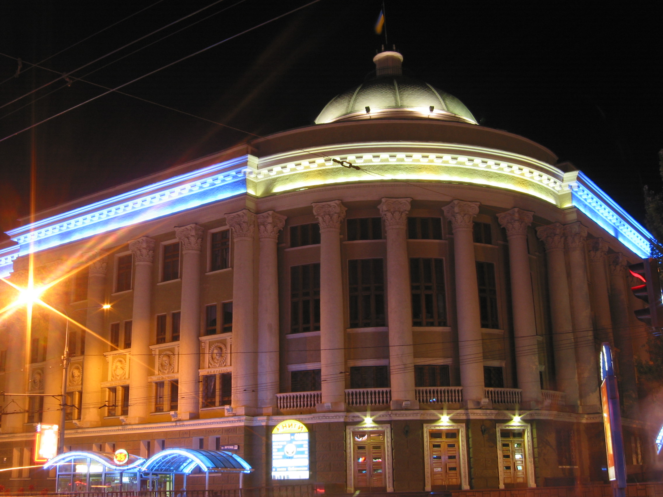 Донецк. Библиотека Крупской